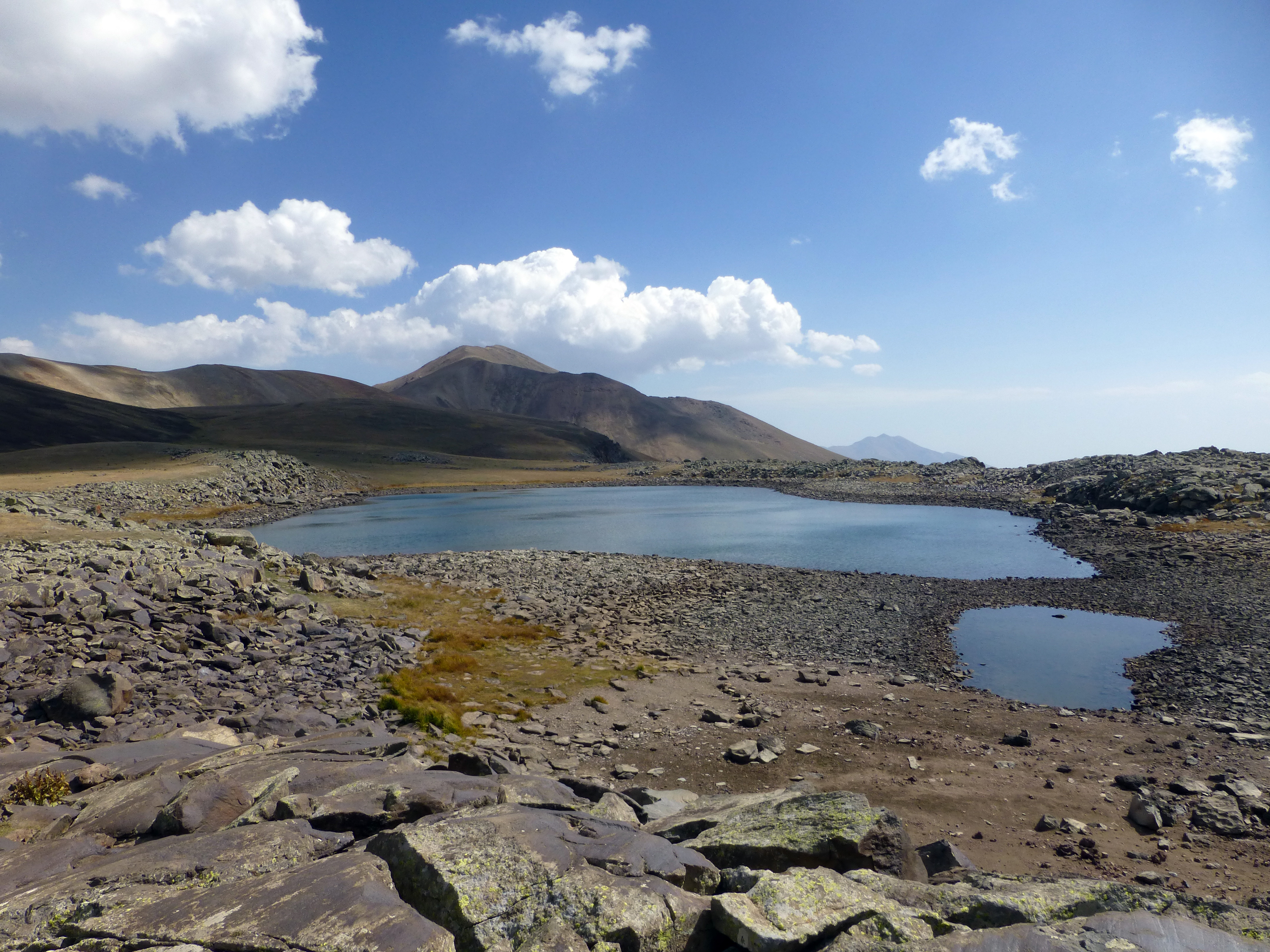 Lac d'Oughtasar (Arménie)